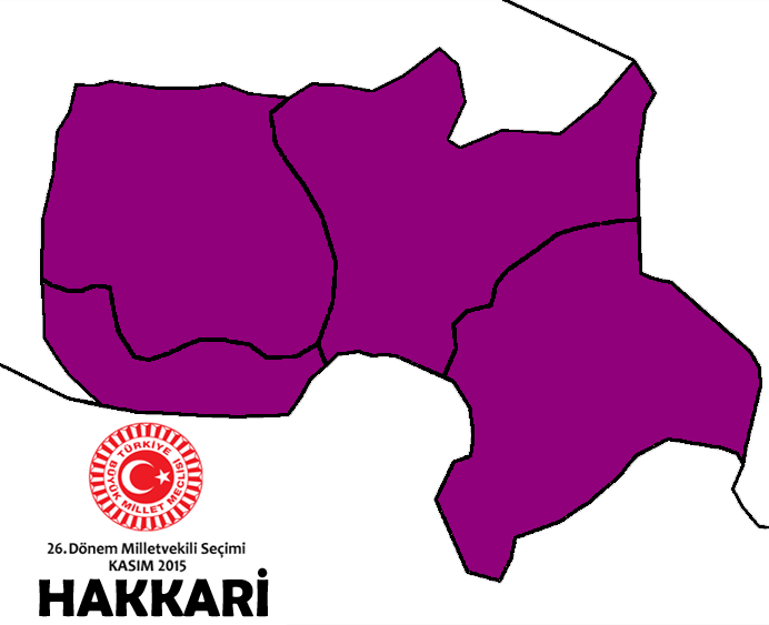 Kasım 2015 seçimleri